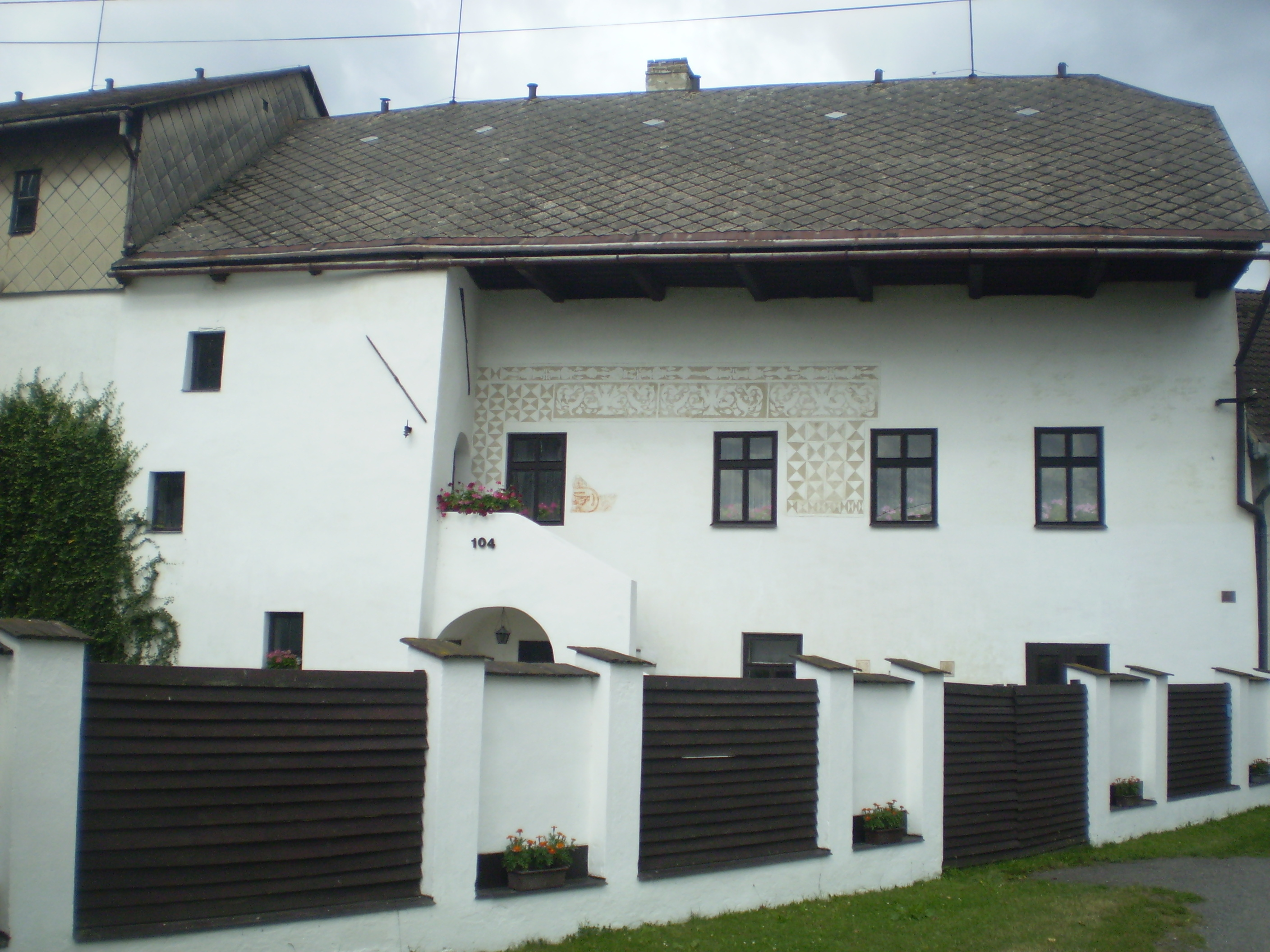 zámek v Novém Veselí (jedno z křídel)